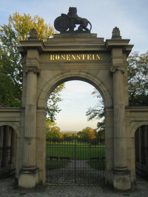 Das Löwentor in Stuttgart mit dem von Wilhelm Pelargus gegossenen Löwen